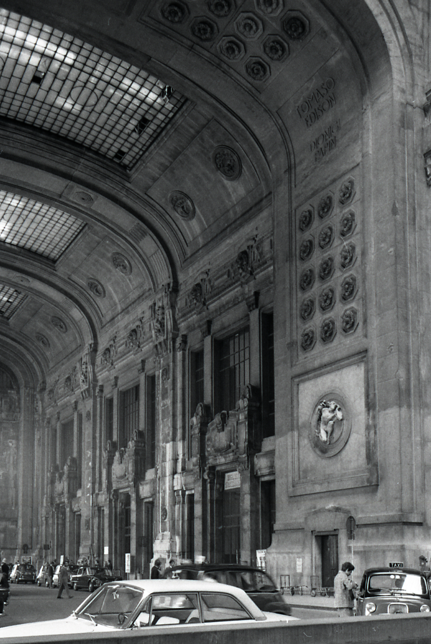 Milano. Stazione Centrale. Serie fotografica : Milano, 1969 / Paolo Monti. - Strisce: 3, Fotogrammi complessivi: 16 : Negativo b/n, gelatina bromuro d'argento/ pellicola ; 35 mm. - ((I fotogrammi hanno una doppia numerazione. . - Sul portanegativi: Nikon Tri X. - Sul dorso e all'interno del portanegativi Monti identifica questa serie con la lettera "B" e specifica: "Sottoesposte"